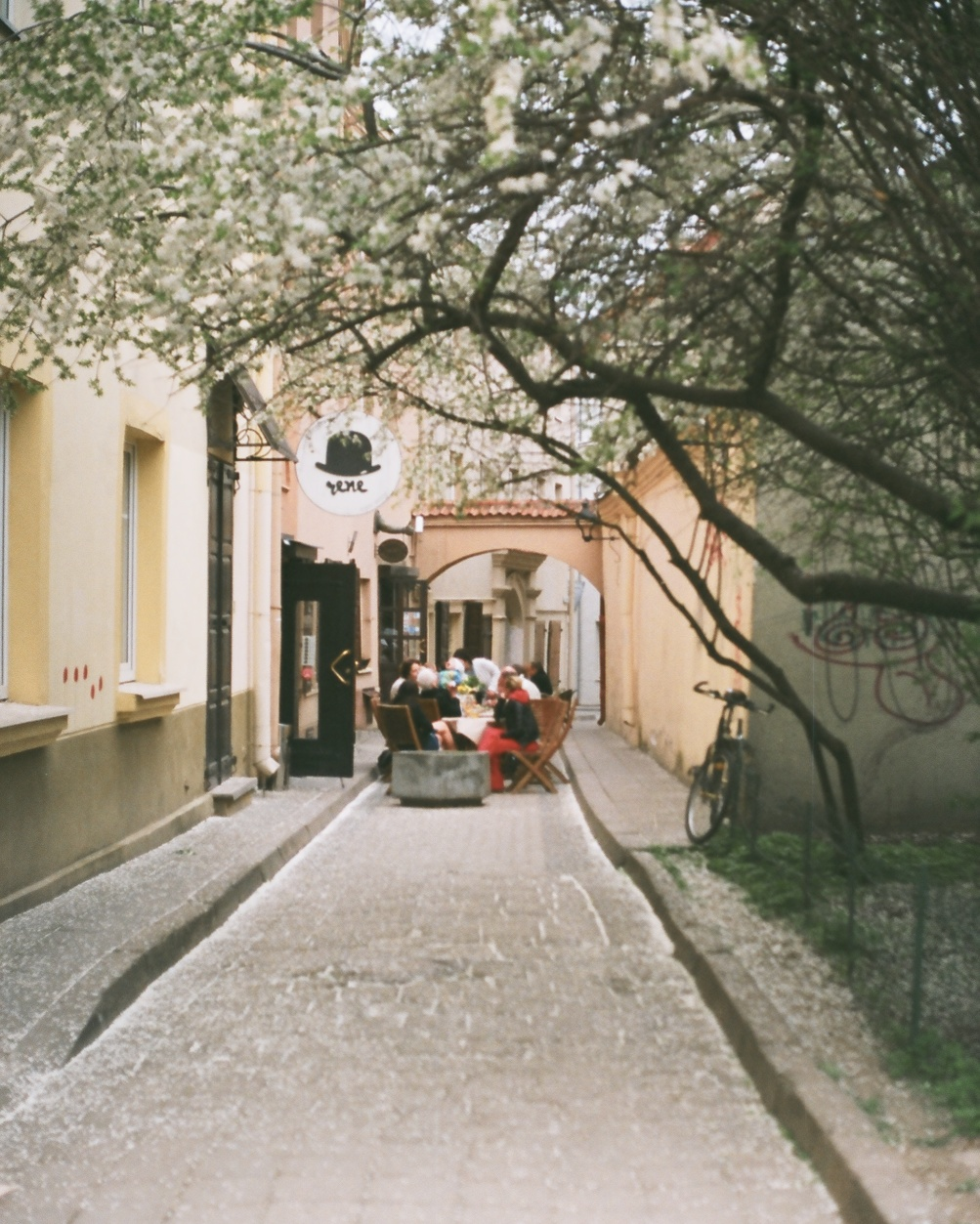 Bloombar